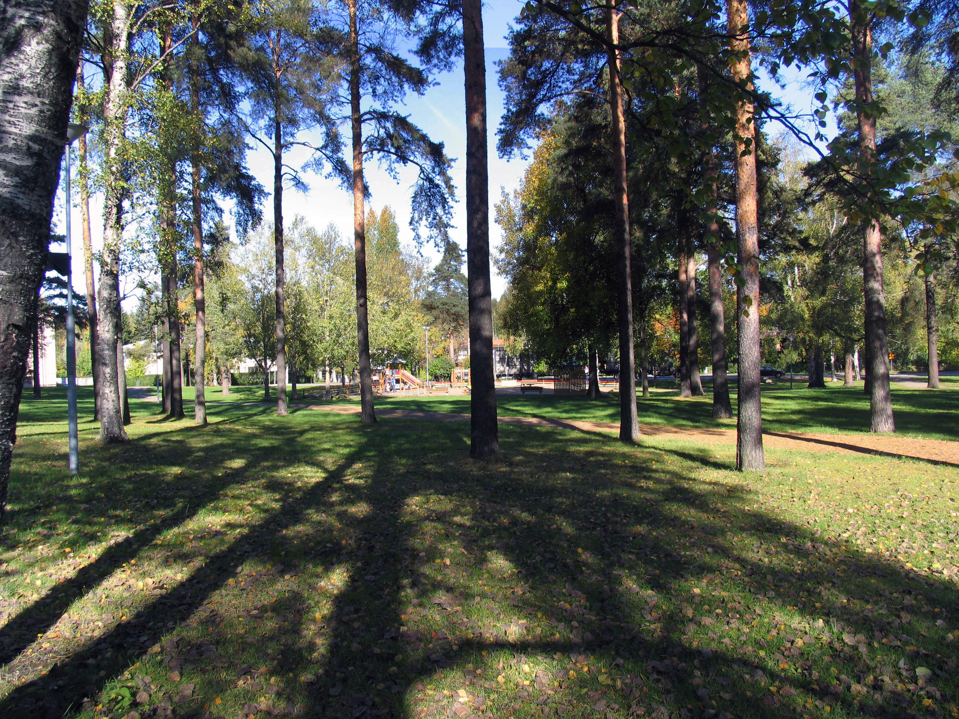 Ristinpuisto park in Joensuu